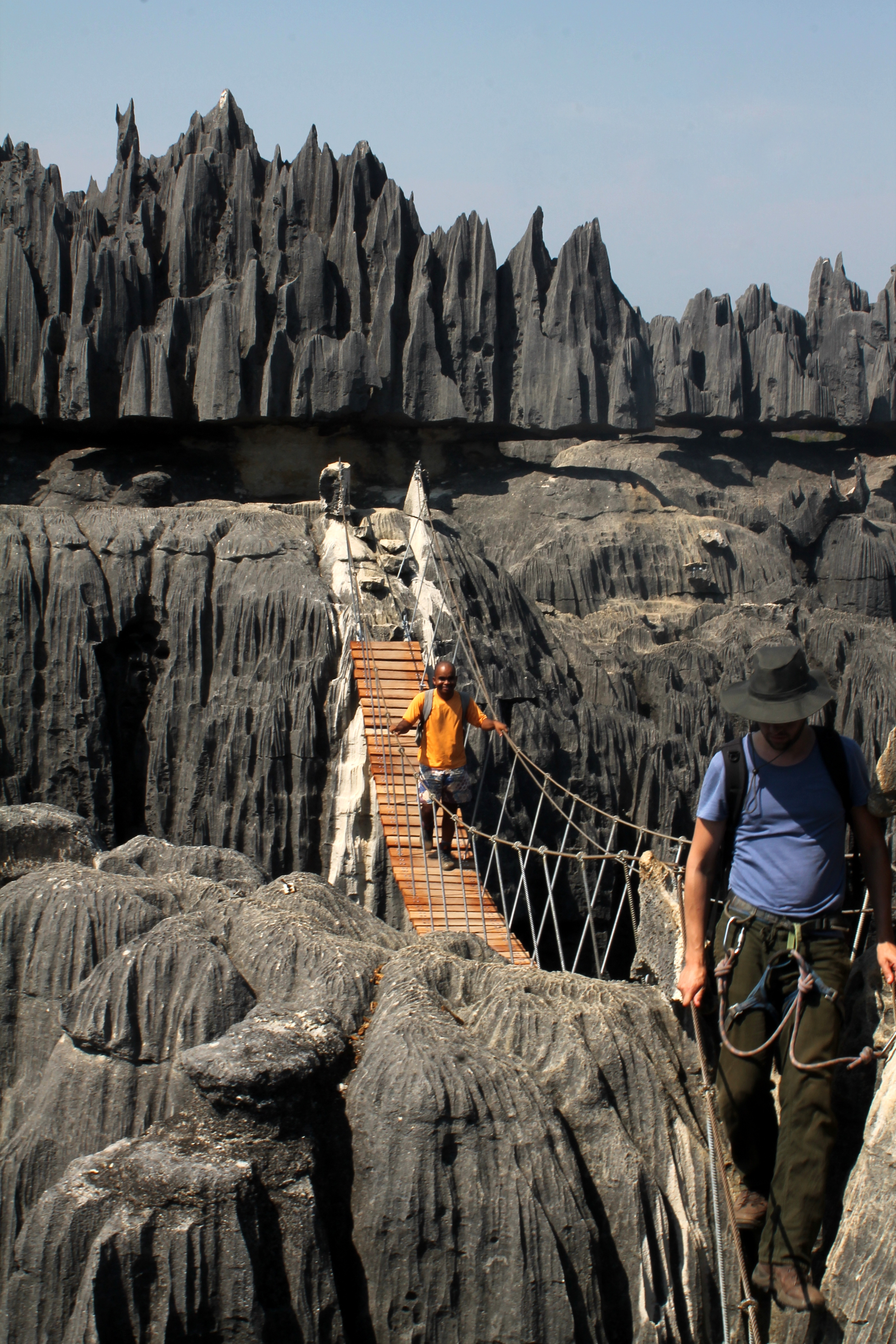 Grand Tsingy